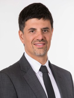 Marcelo Díaz Díaz en la fotografía oficial de diputados periodo 2018-2022. (Fotos: Christel Andler, René Lescornez, Johanna Zárate)